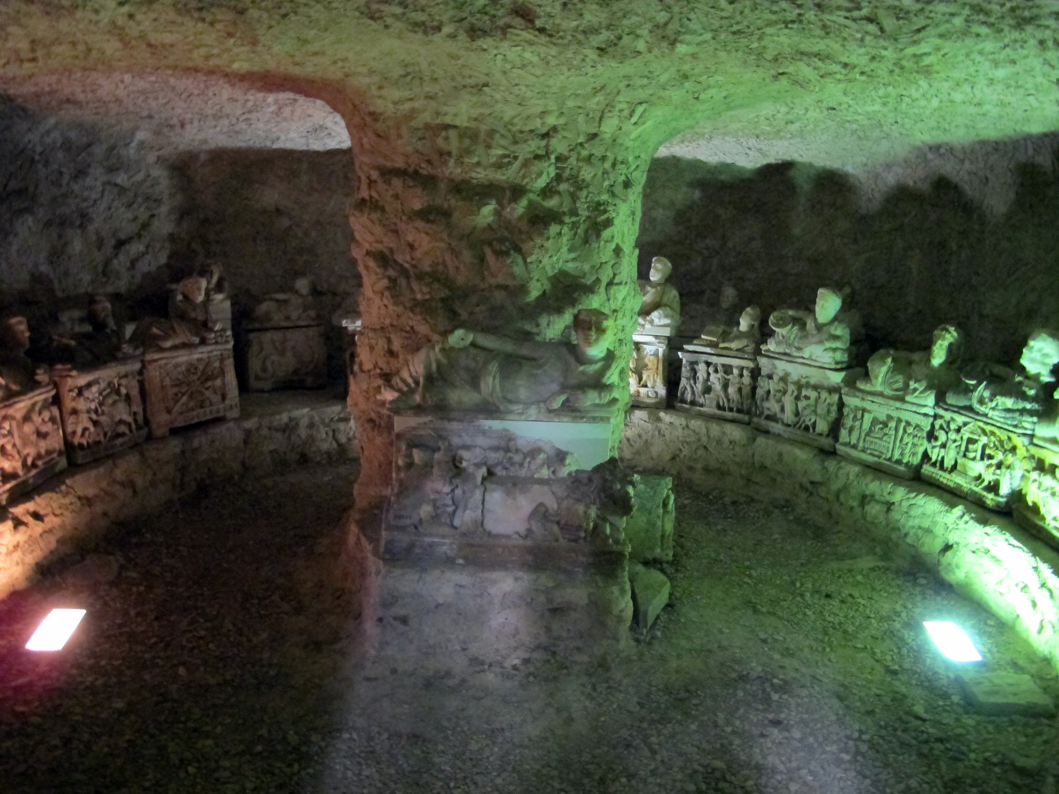 Tomba Inghirami da Volterra